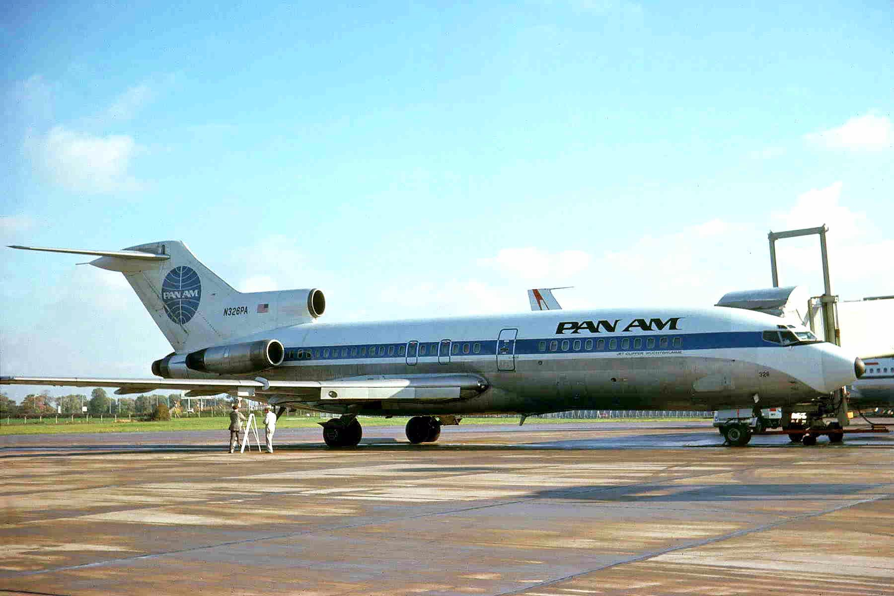 N326PA B727-21 Pan American MAN